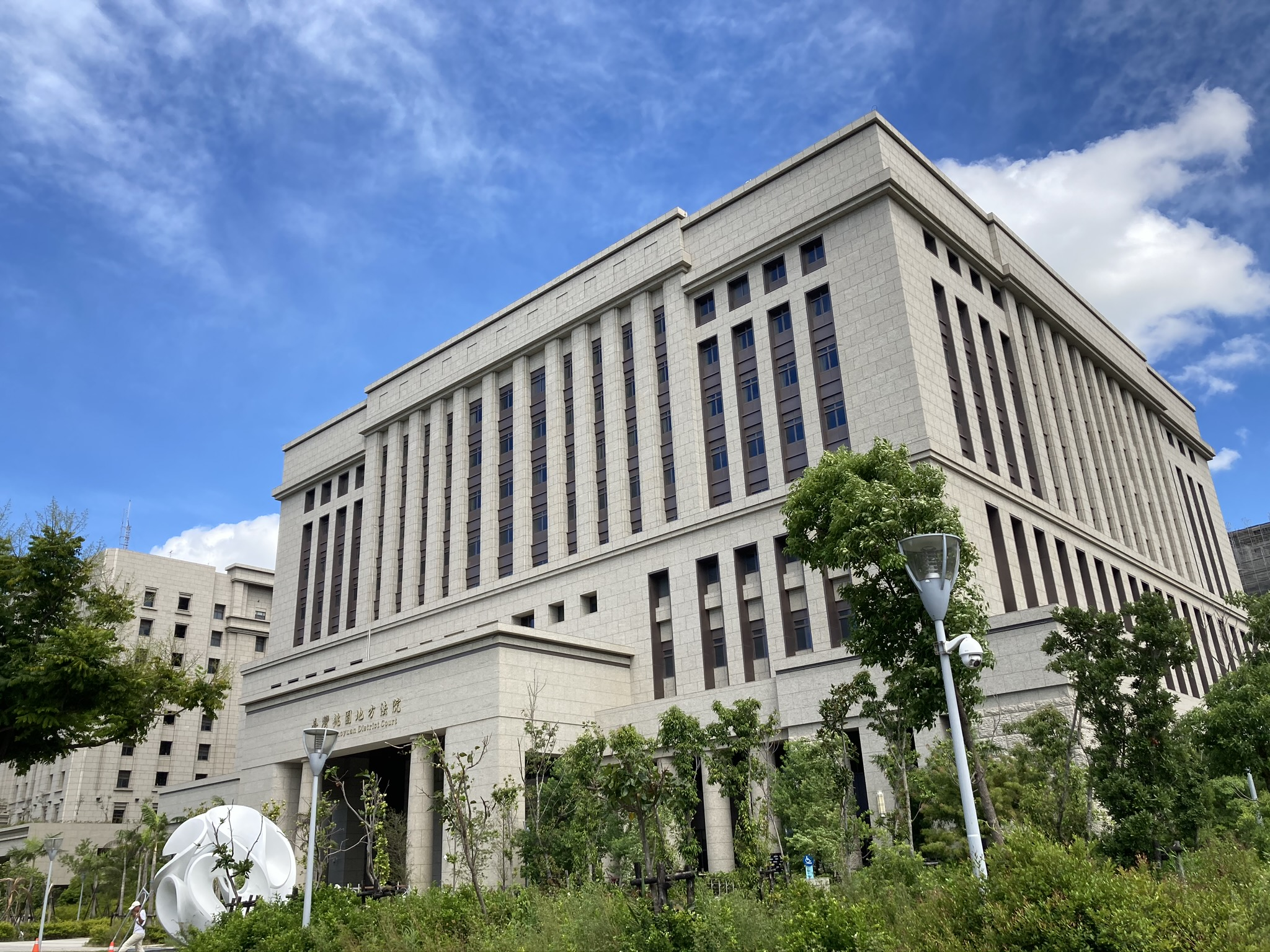 中文（台灣）: 桃園新地方法院 位於桃園市桃園區正光路888號